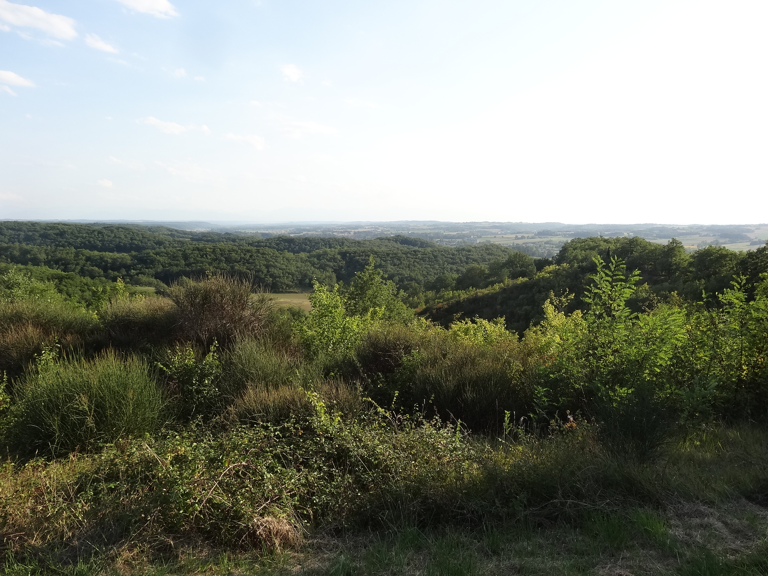 Vue de Masseube.